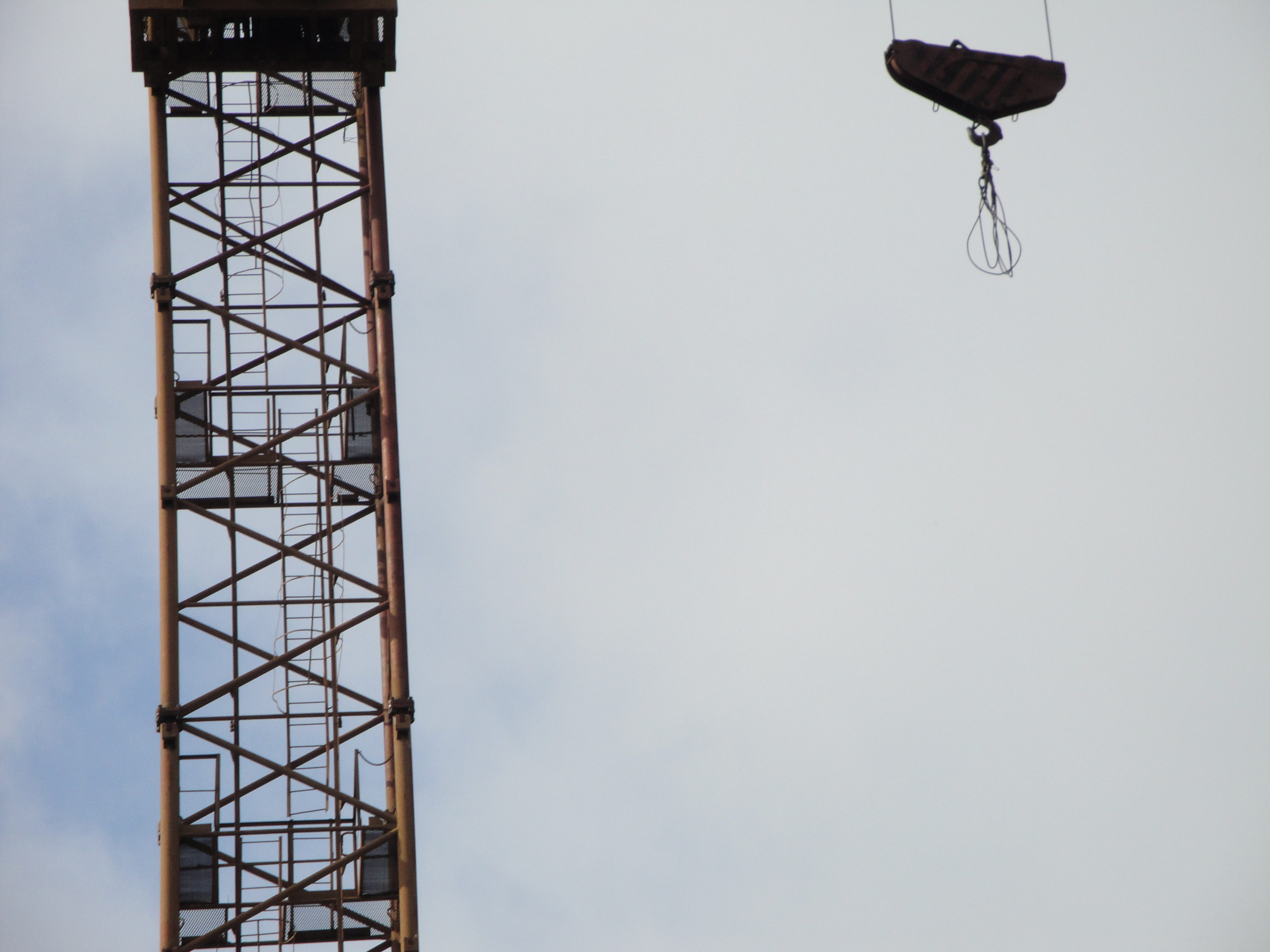 КБ-674 - Трёхосная крюковая подвеска 25т - дополнительная обойма отсутствует